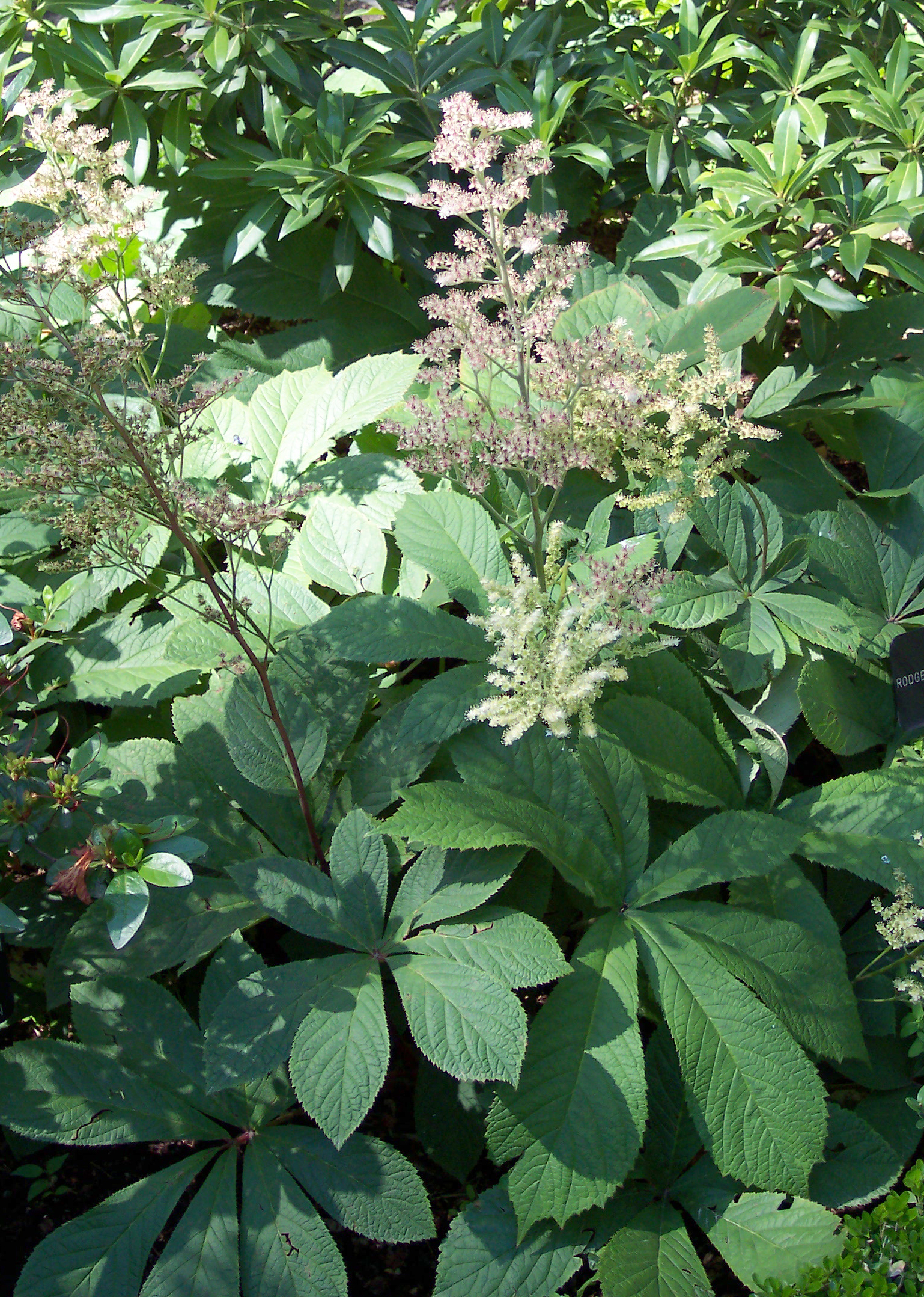 Rodgersia aesculifolia. Real Jardín Botánico, Madrid.